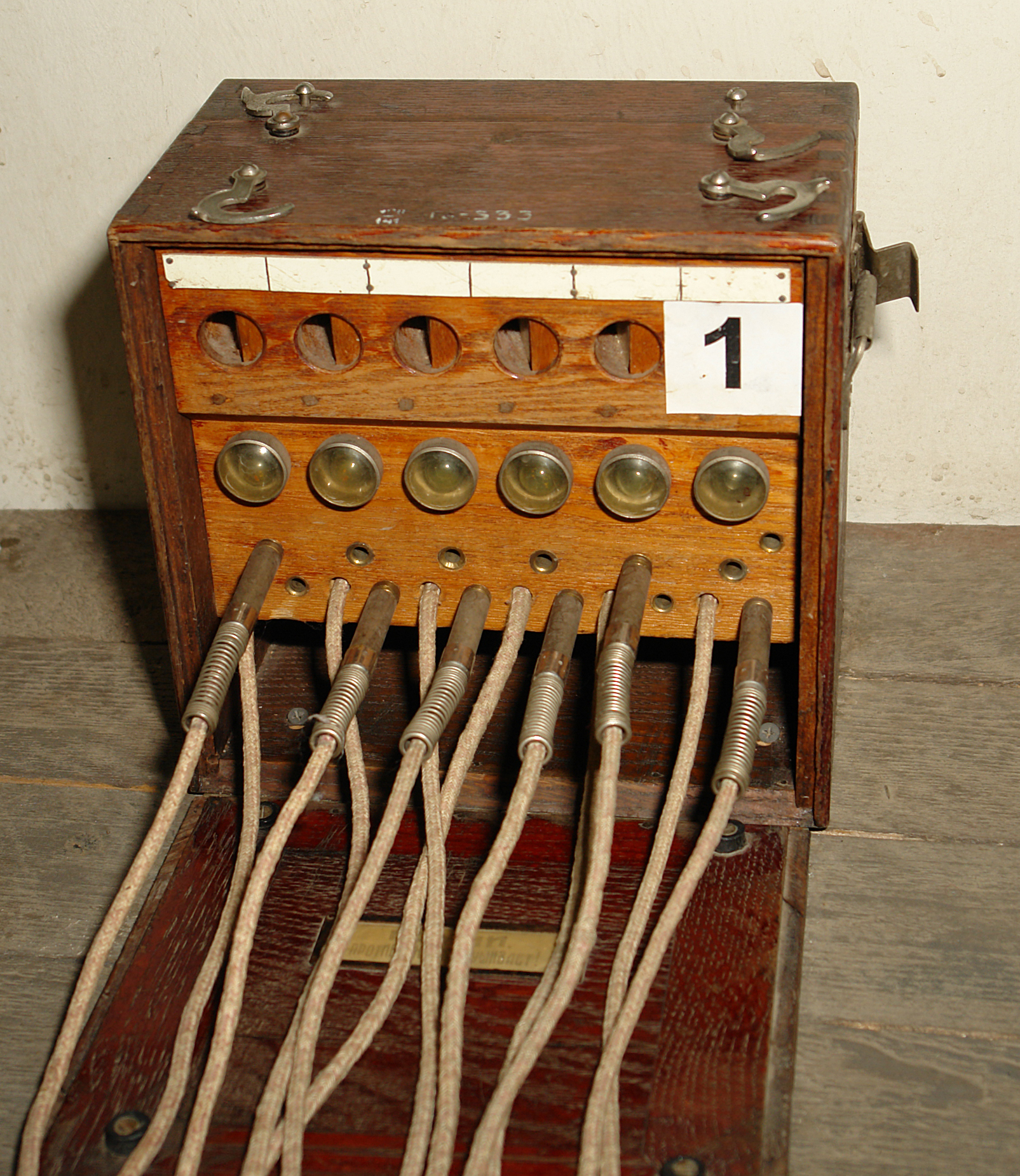 ПОЛЕВОЙ ФОНОИНДУКТОРНЫЙ КОММУТАТОР ФИН-6 Разработан в 1941 году. На оснащение Красной Армии принят не был; однако большая опытная партия коммутаторов широко использовалась в войсках. Предназначен для обеспечения связи в звене батальон-дивизия. Емкость - 6 номеров (допускается включение любых типов телефонных аппаратов). Военно-исторический музей артиллерии, инженерных войск и войск связи, Санкт-Петербург.